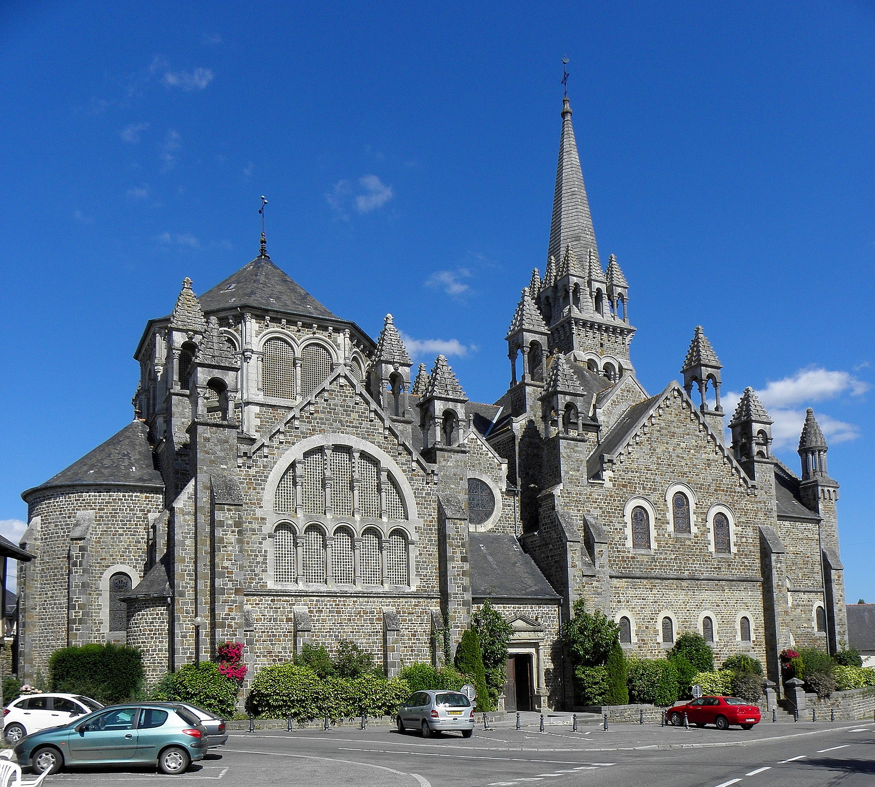 Église Sainte-Trinité de Tinténiac (35).